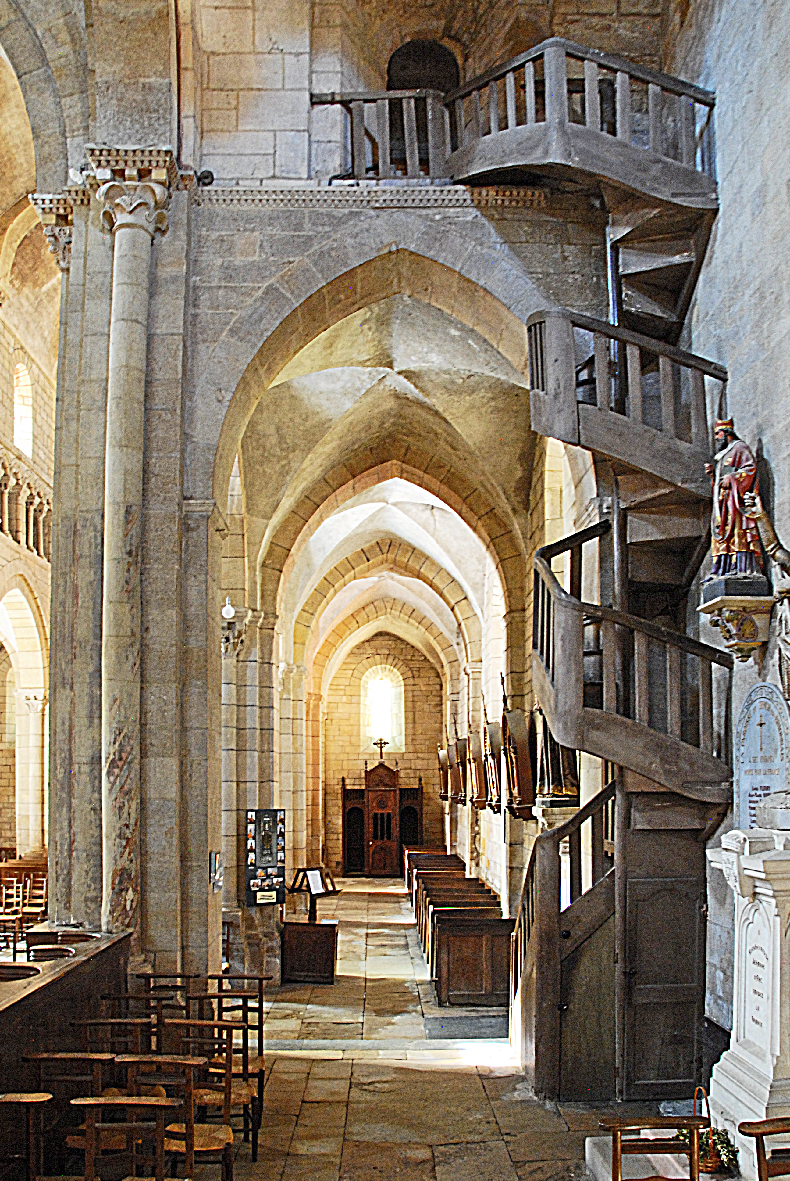 St-Hilaire de Semur-en-Brionnais, nördl. Seitenschiff nach Westen